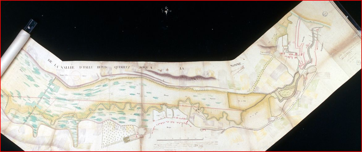 Marais communaux de Pont et Querrieu ; château de Bussy-lès-Daours ; village de Daours ; confluence de l'Hallue et de la Somme.